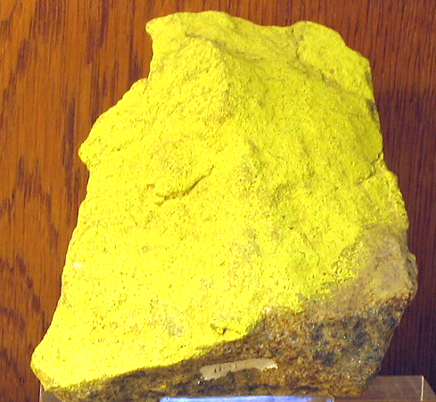 Carnotite from Colorado,USA